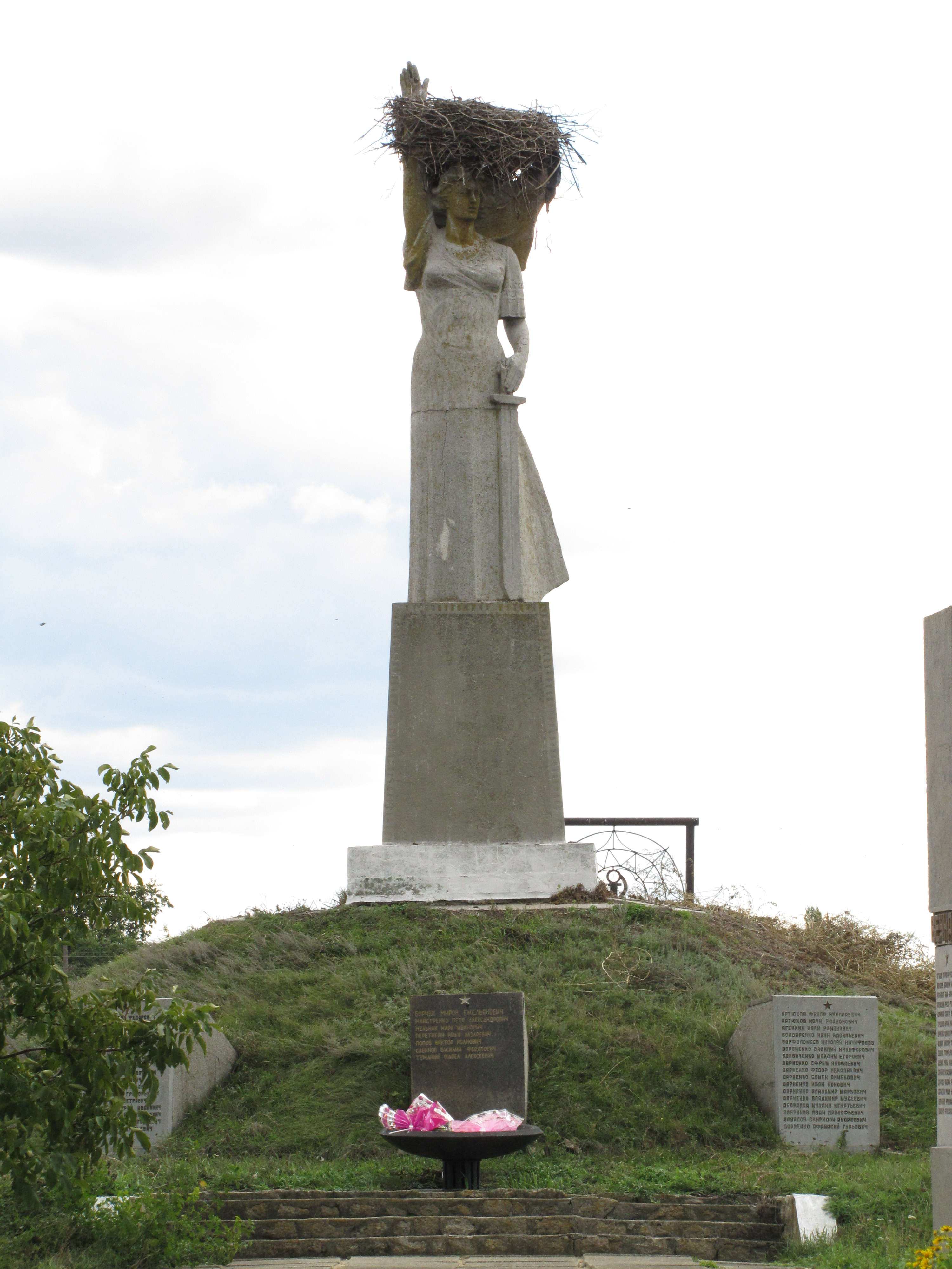 Украина. Николаевская область, Братский район, село Ильичовка